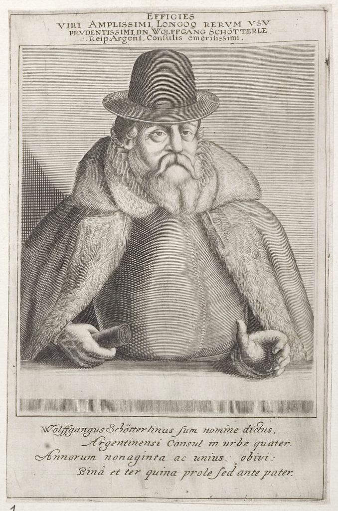 Grafik aus dem Klebeband Nr. 3 der Fürstlich Waldeckschen Hofbibliothek Arolsen Motiv: Wolfgang Schötterle/Schütterlin (um 1529–1620), Ratsherr in Straßburg (1572 Bürgermeister) GND: 1019750472